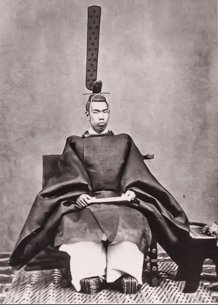 黄櫨染御袍 明治天皇